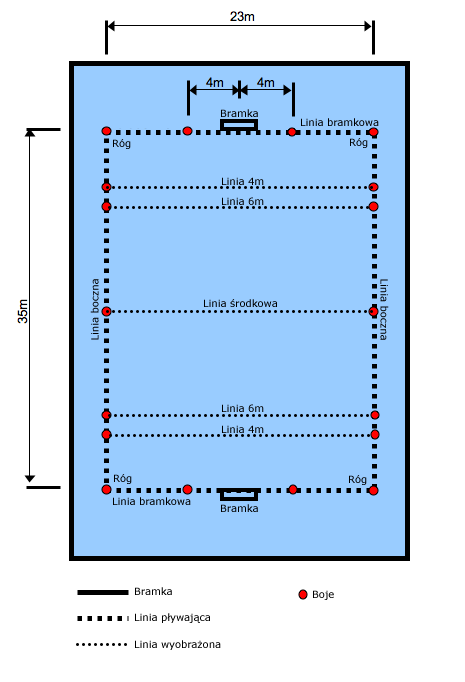 Boisko do kajakpolo